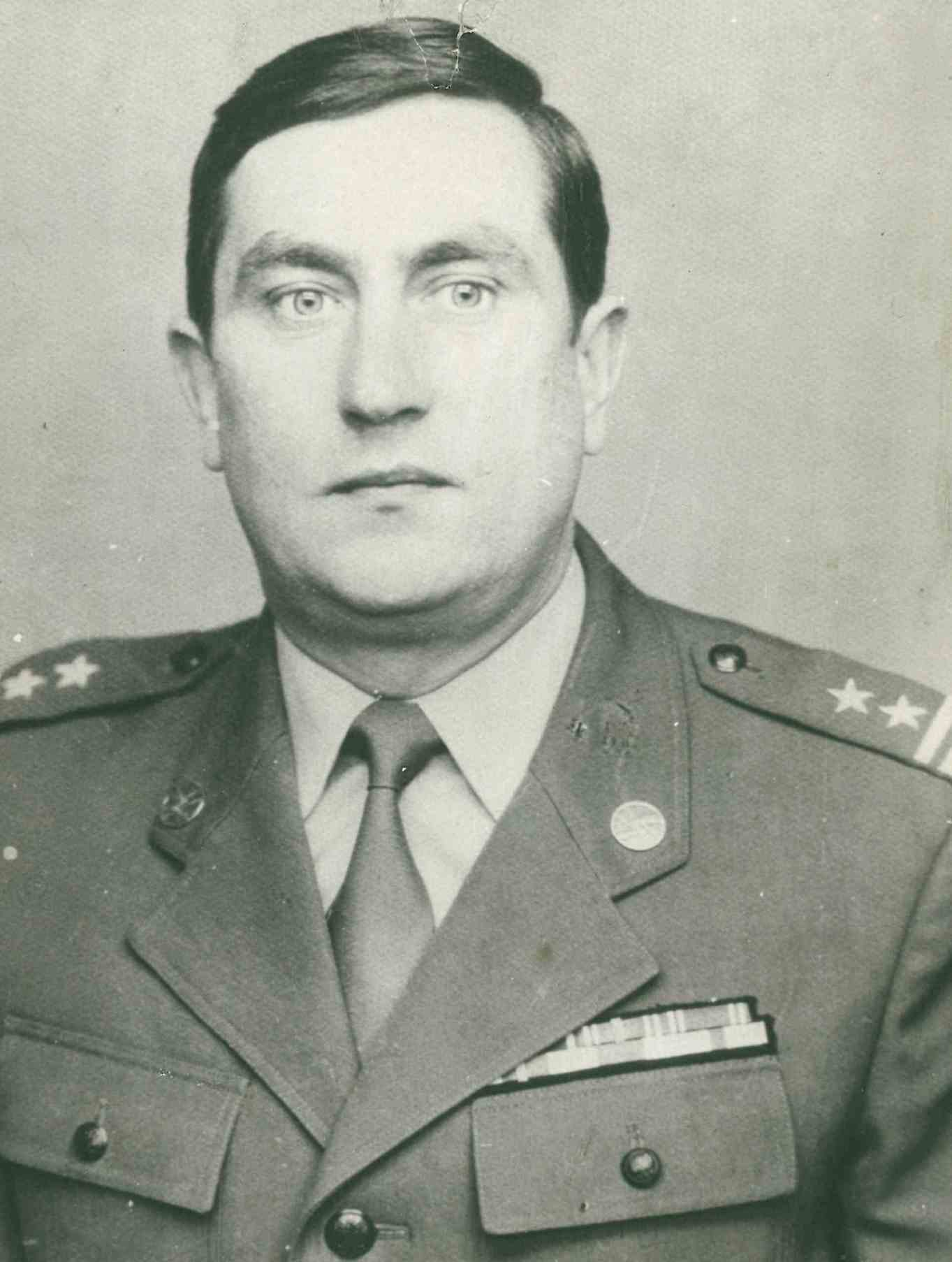 Przasnysz, 1982r. Dowódca 20 OSSR ( JW 3832) - ppłk Robert Łuczkiewicz (1978-1983)